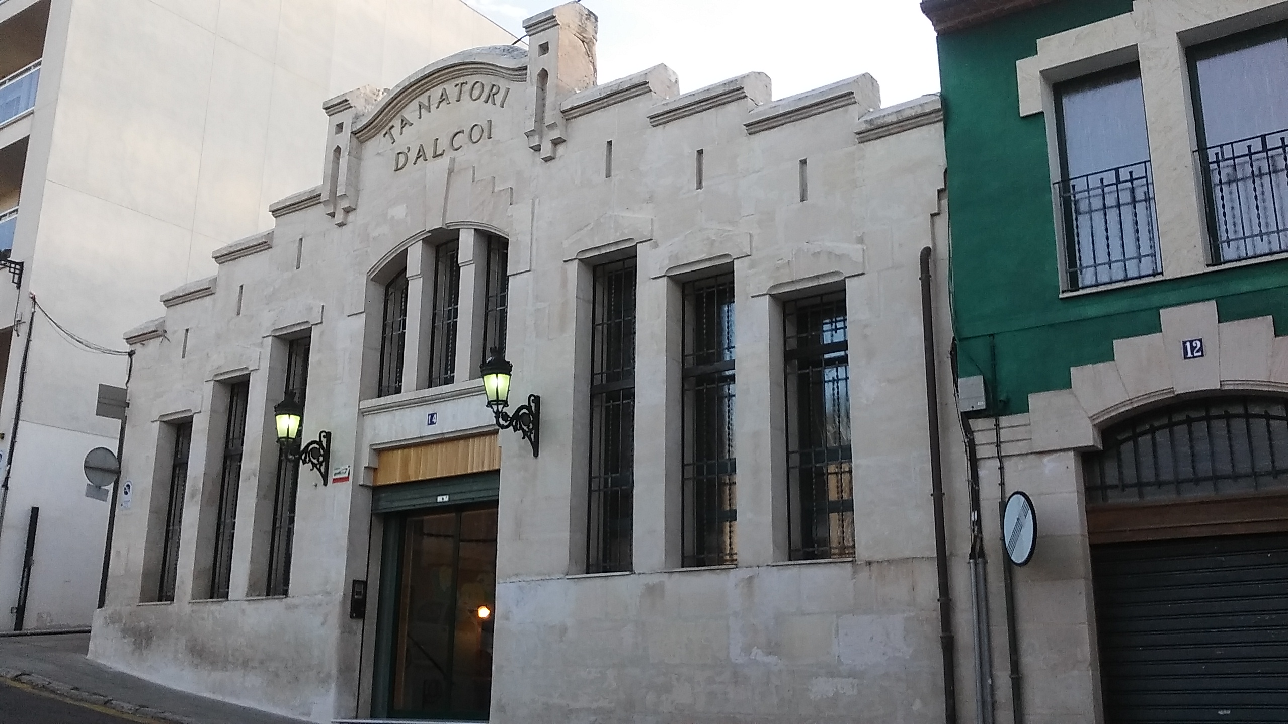 Fábrica de "El Rosendo" en carrer Sant Vicent Ferrer número 14, en Alcoy ( Alacant). Obra modernista de Timoteo Briet Montaud en l'any 1914.